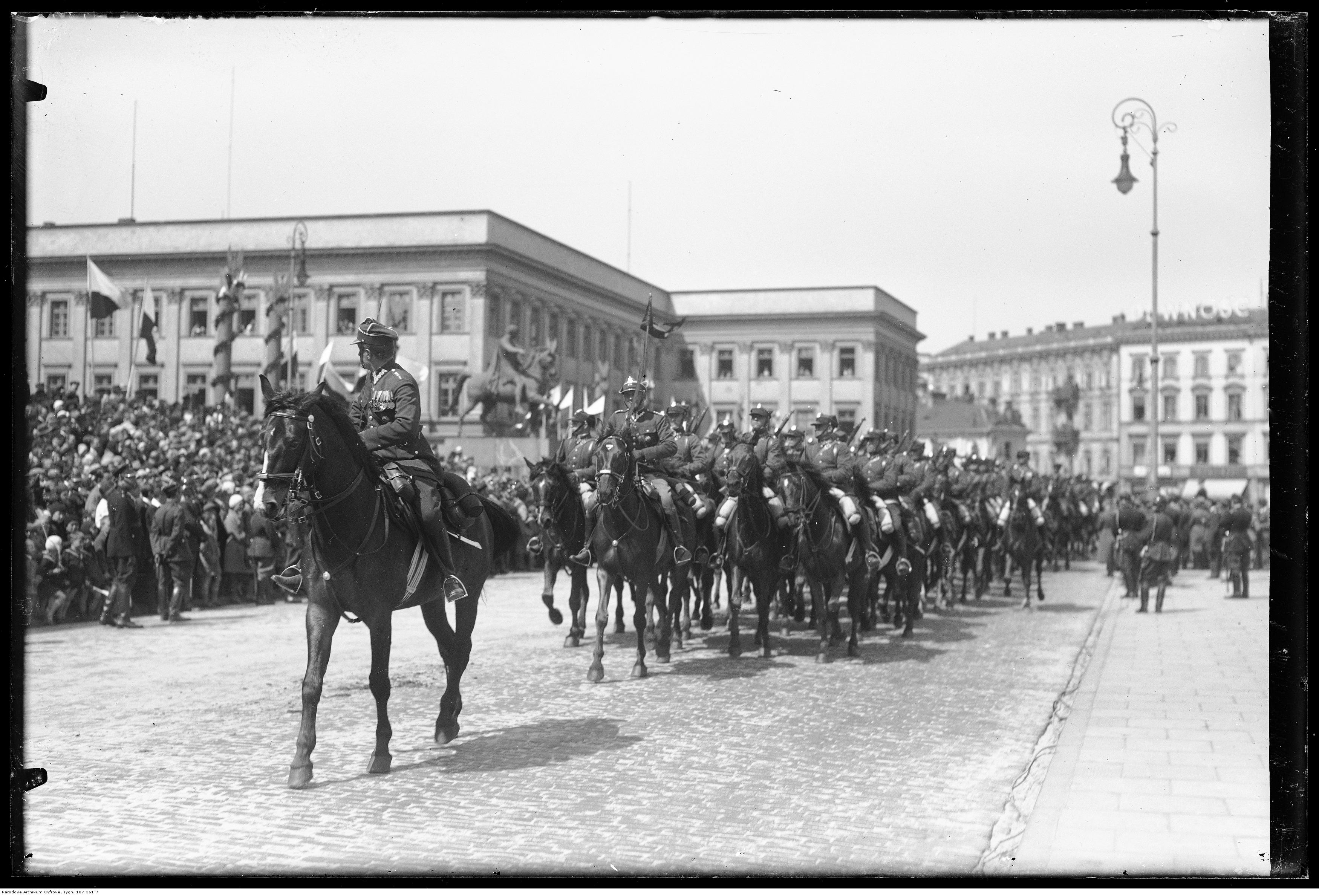 Defilada - szwadron Pionierów.